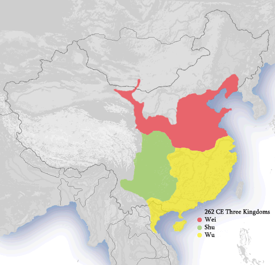 Saam Gwok 262 CE.png